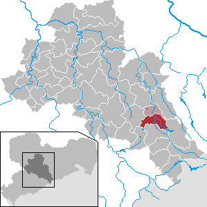 Lichtenberg/Erzgeb., Landkreis Mittelsachsen, Sachsen